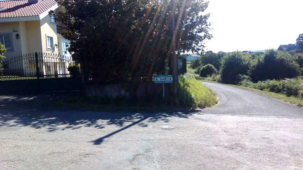 Vista da Garita, Fene.